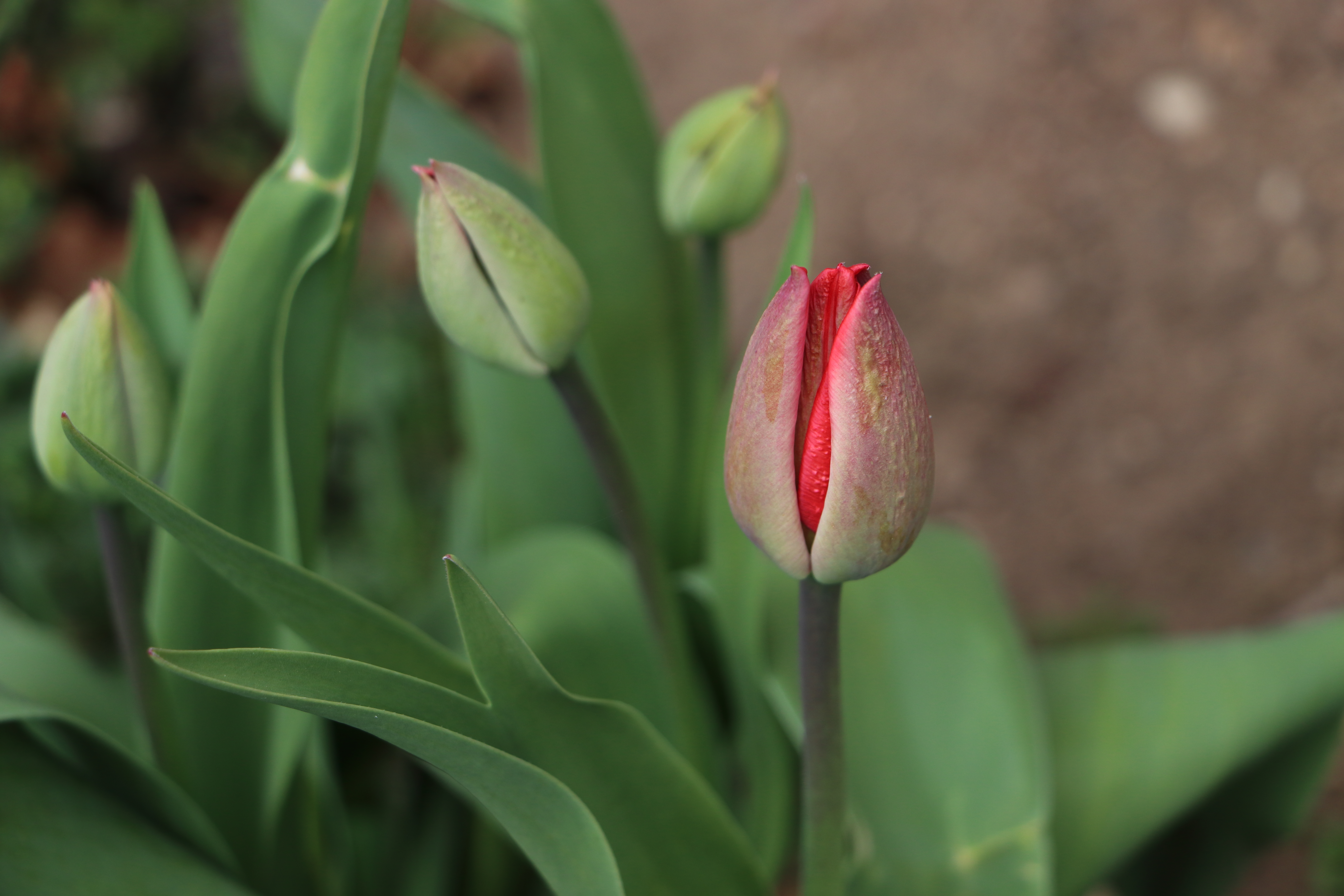 Tulpan eller trädgårdstulpan (Tulipa gesneriana)